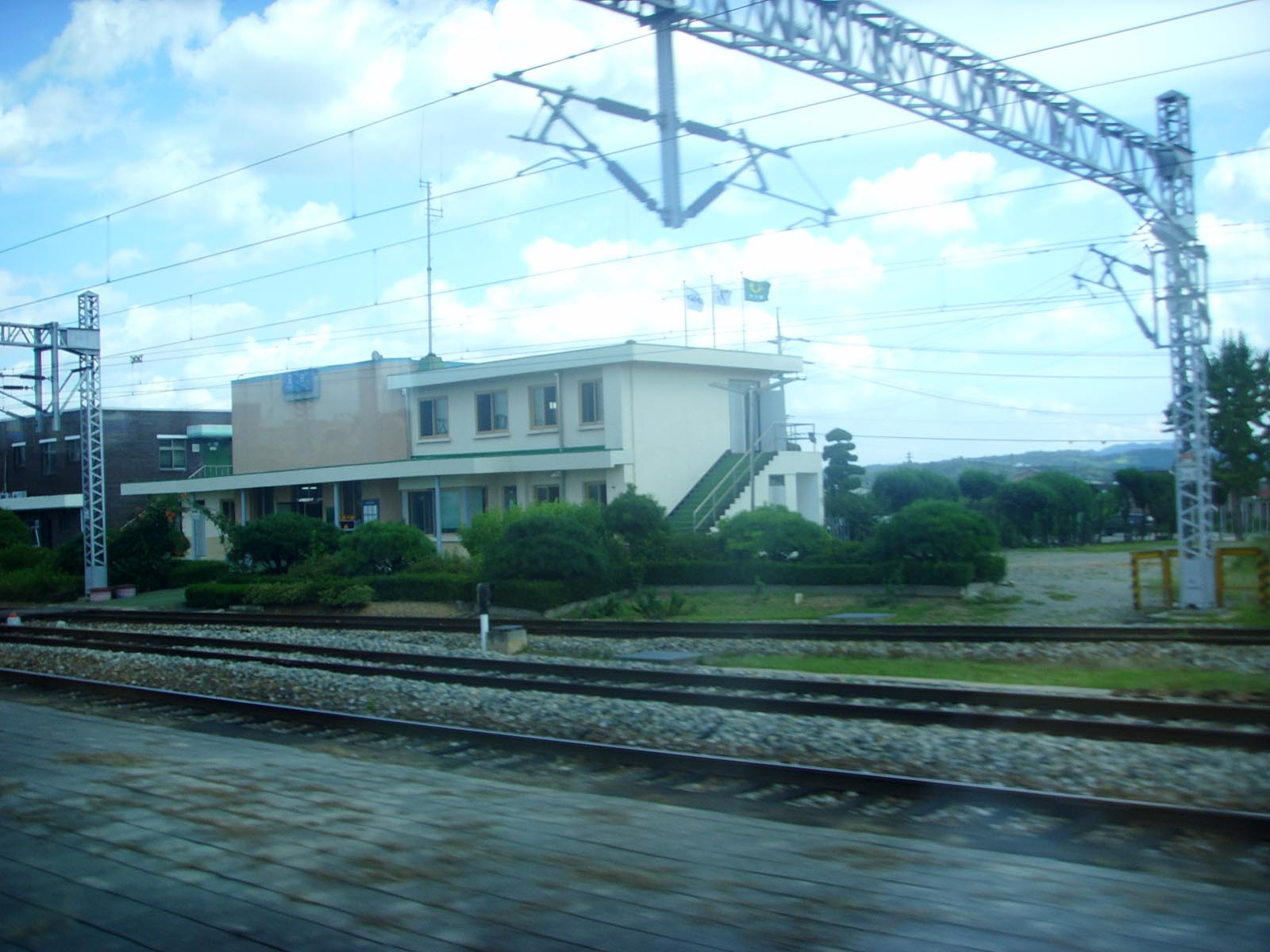 Osong Station (Chungbuk Line)